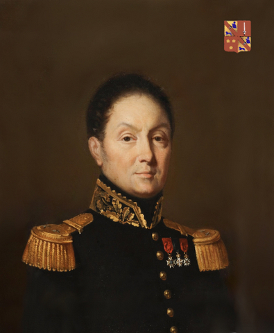 portrait XIXe